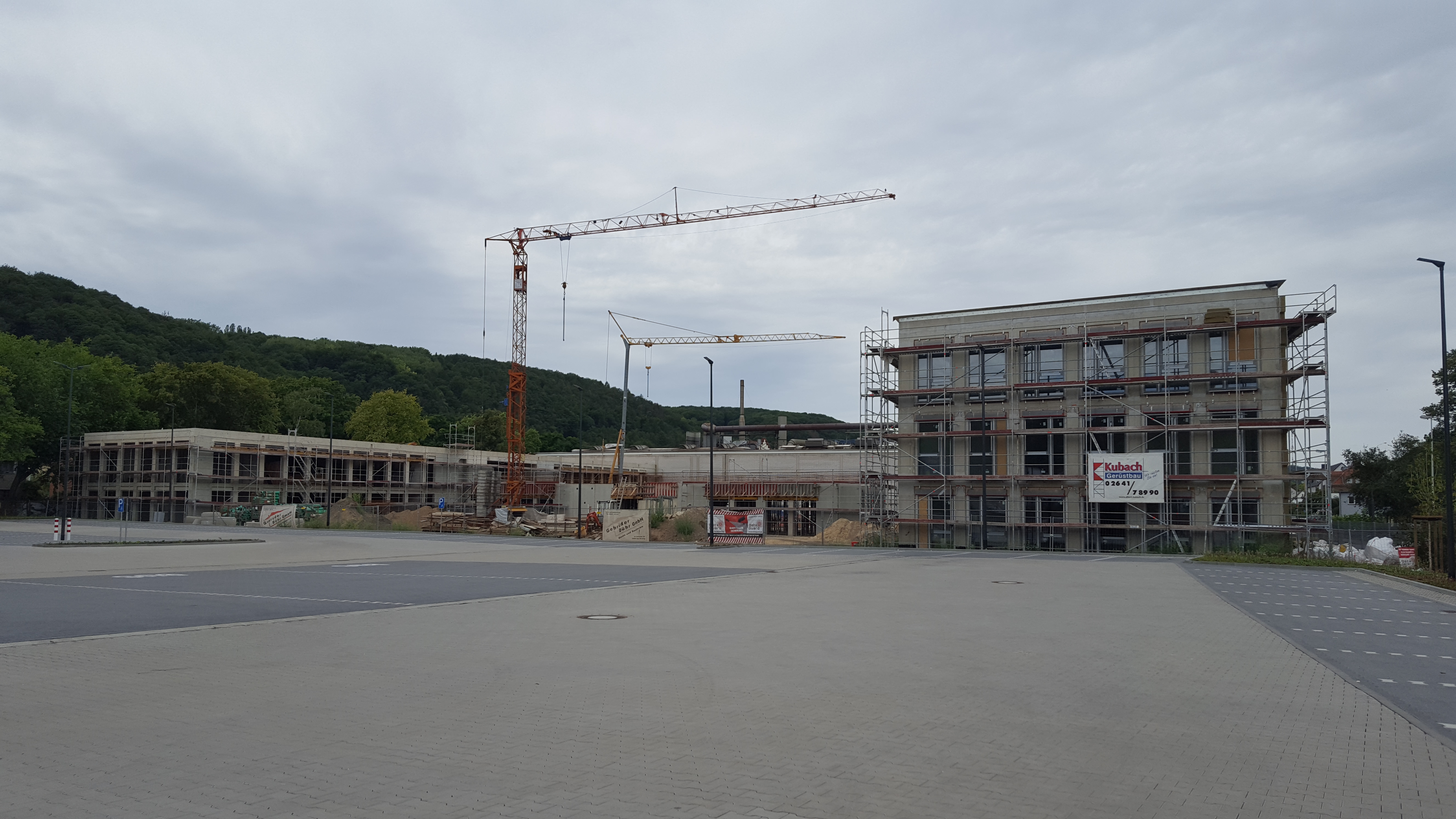 Neubau, Bad Godesberg